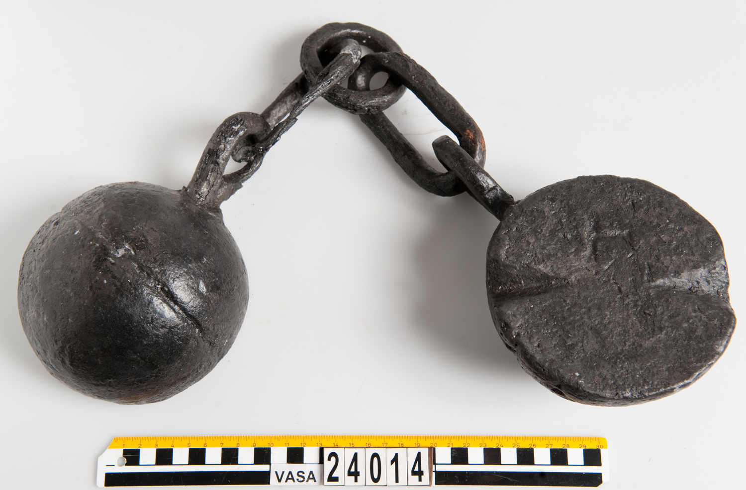 Kedjelod: Ett komplett kedjelod. Två halvor med öglor som är sammanlänkade med tre länkar.